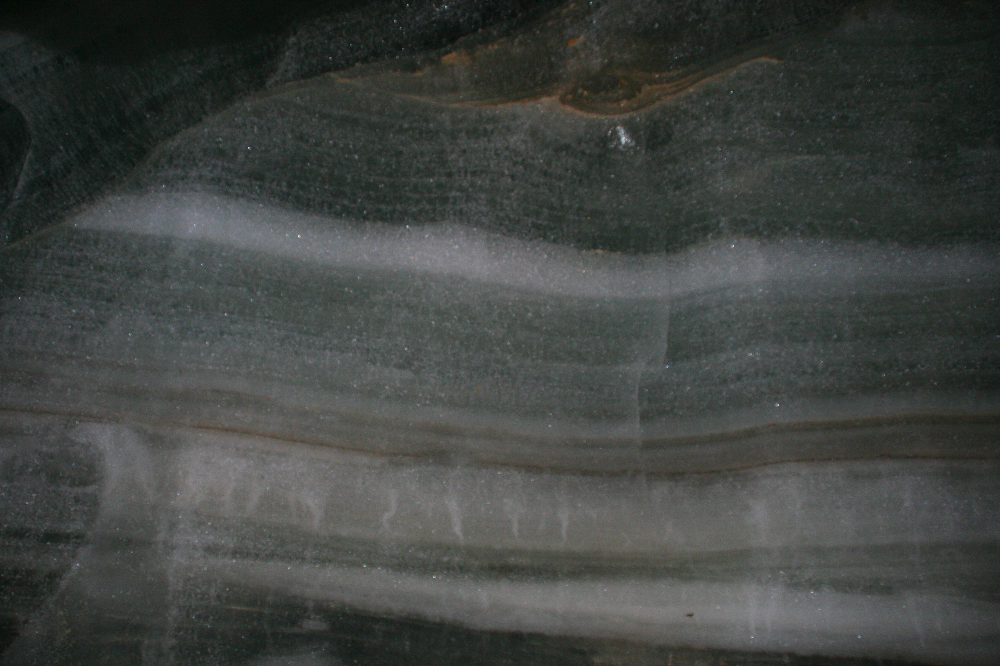 Schellenberger Eishöhle